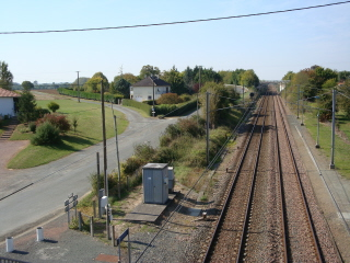 Vue de la passerelle